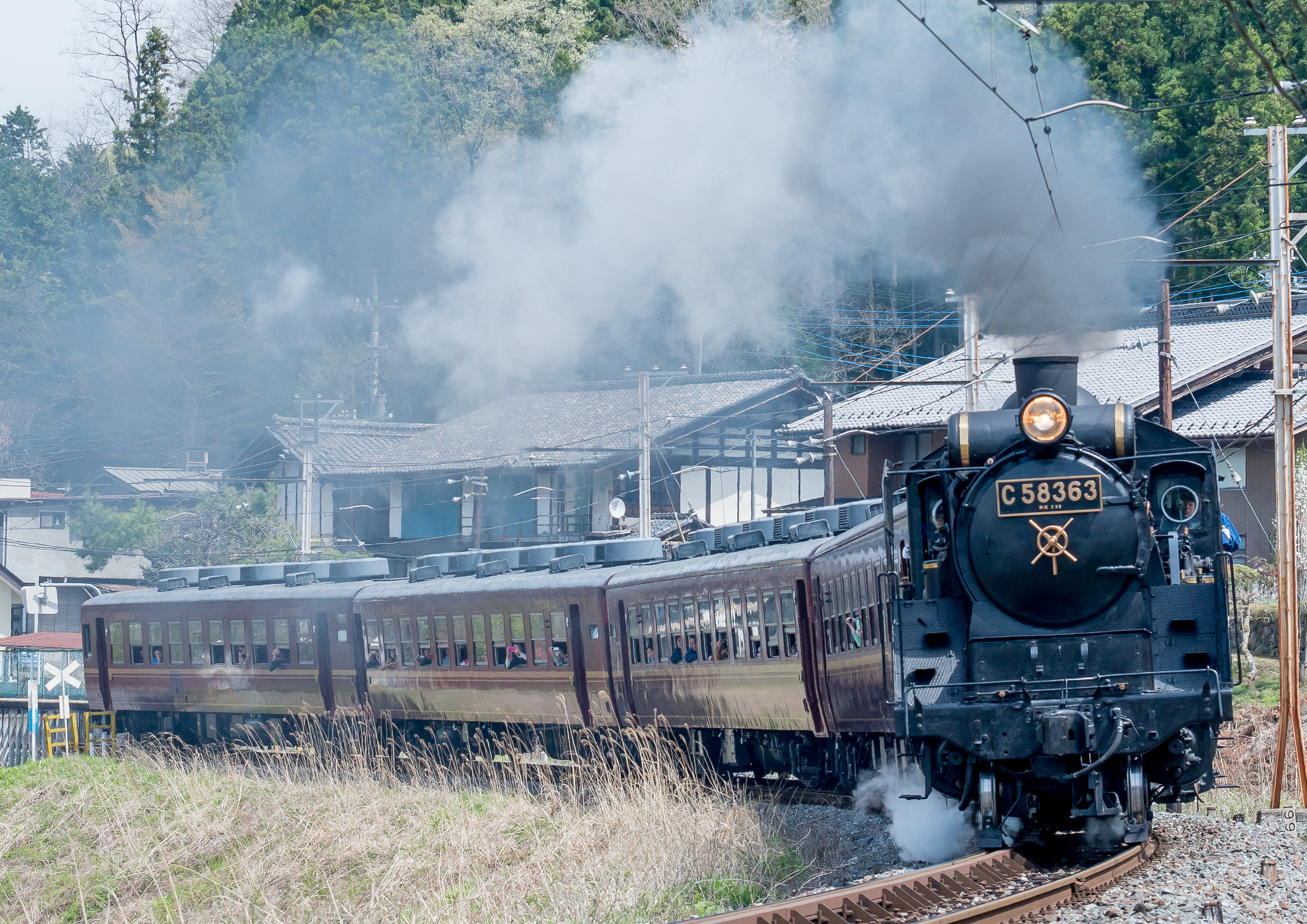 秩父鉄道白久駅を過ぎ終着三峰口駅に向かうC58 363牽引のSLパレオエクスプレス号